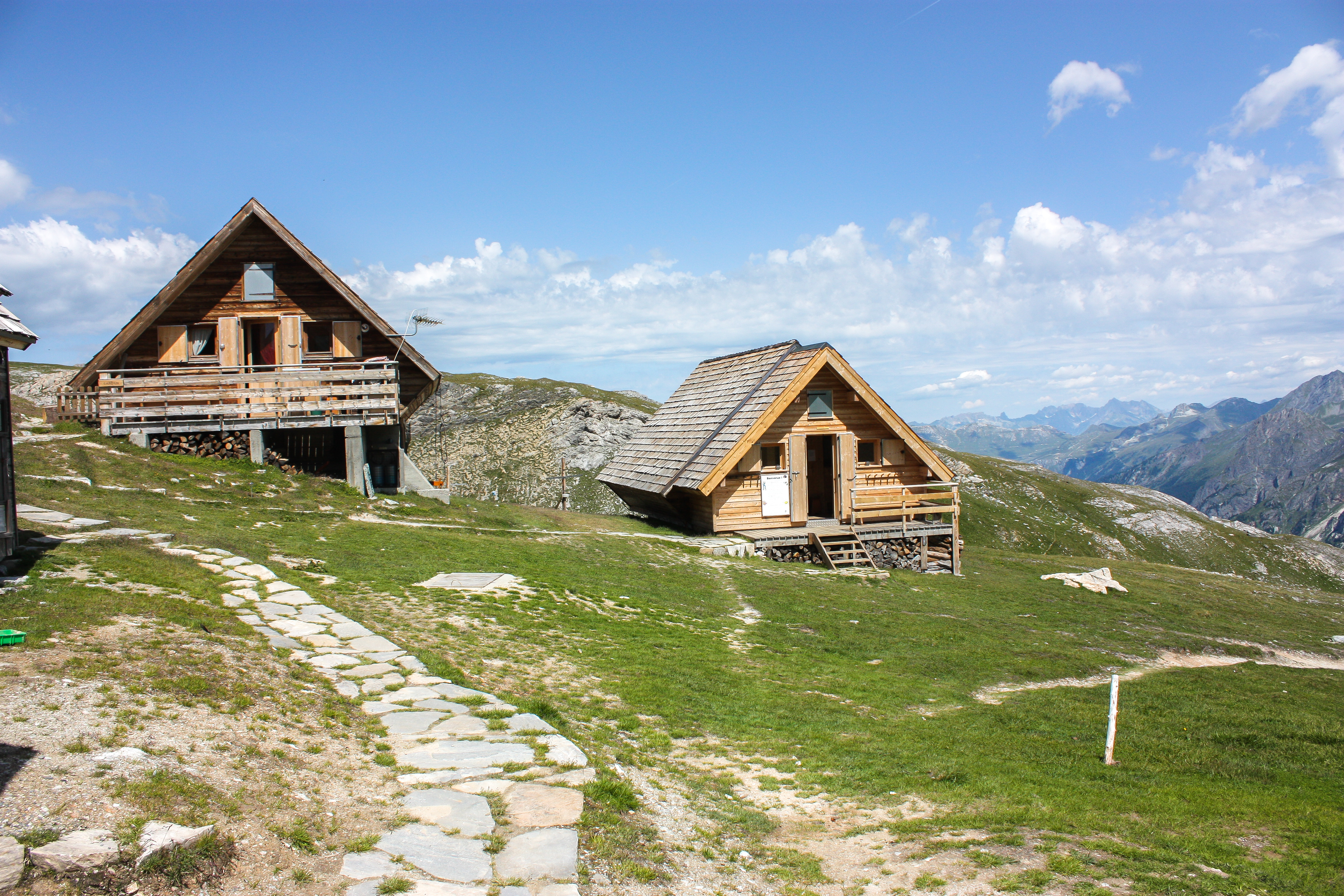 Deux des 3 bâtiments formant le refuge de la Valette.